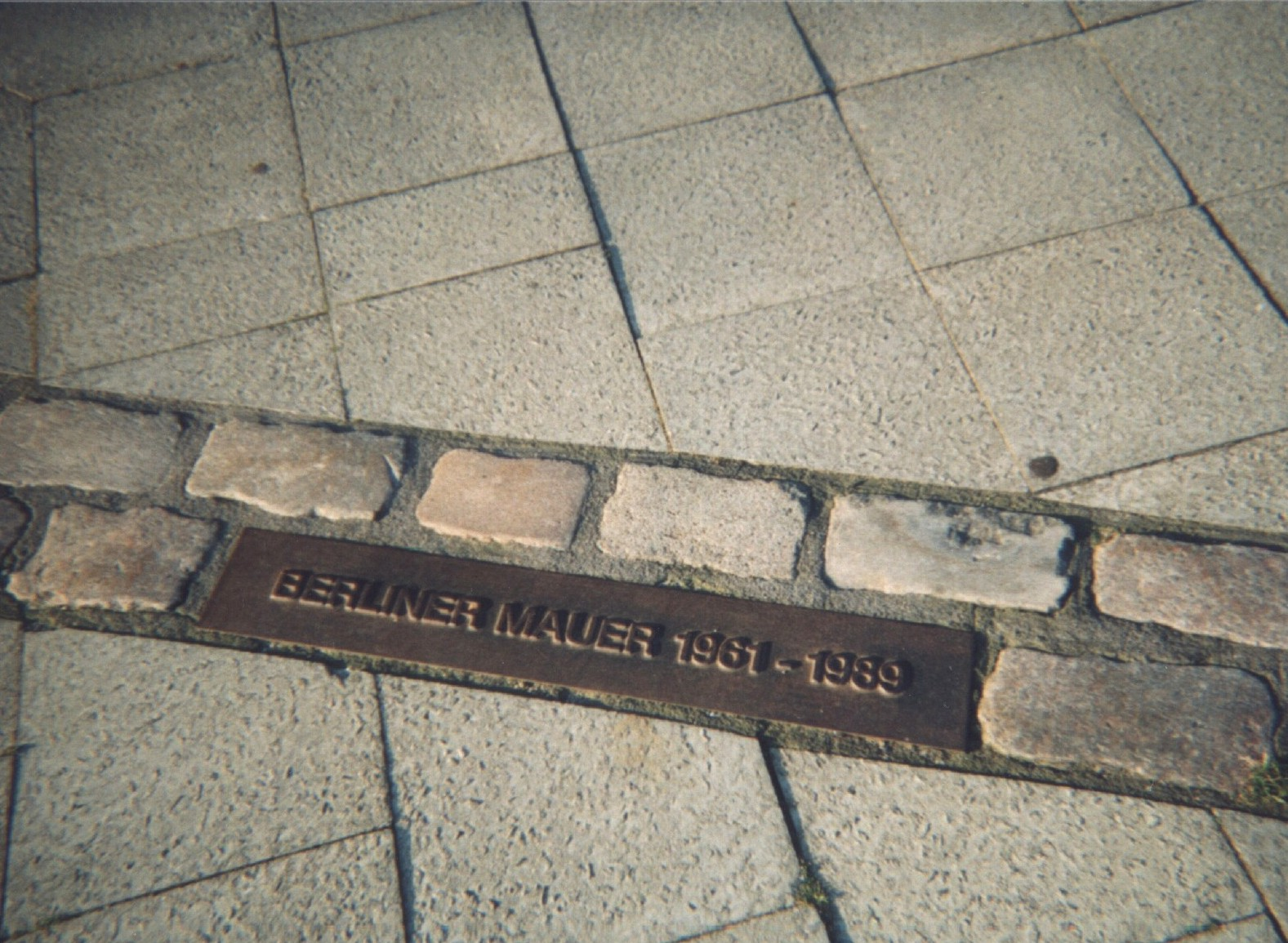 Kennzeichnung des Mauerverlaufs in Berlin-Mitte, Chaussee- Ecke Boyenstraße